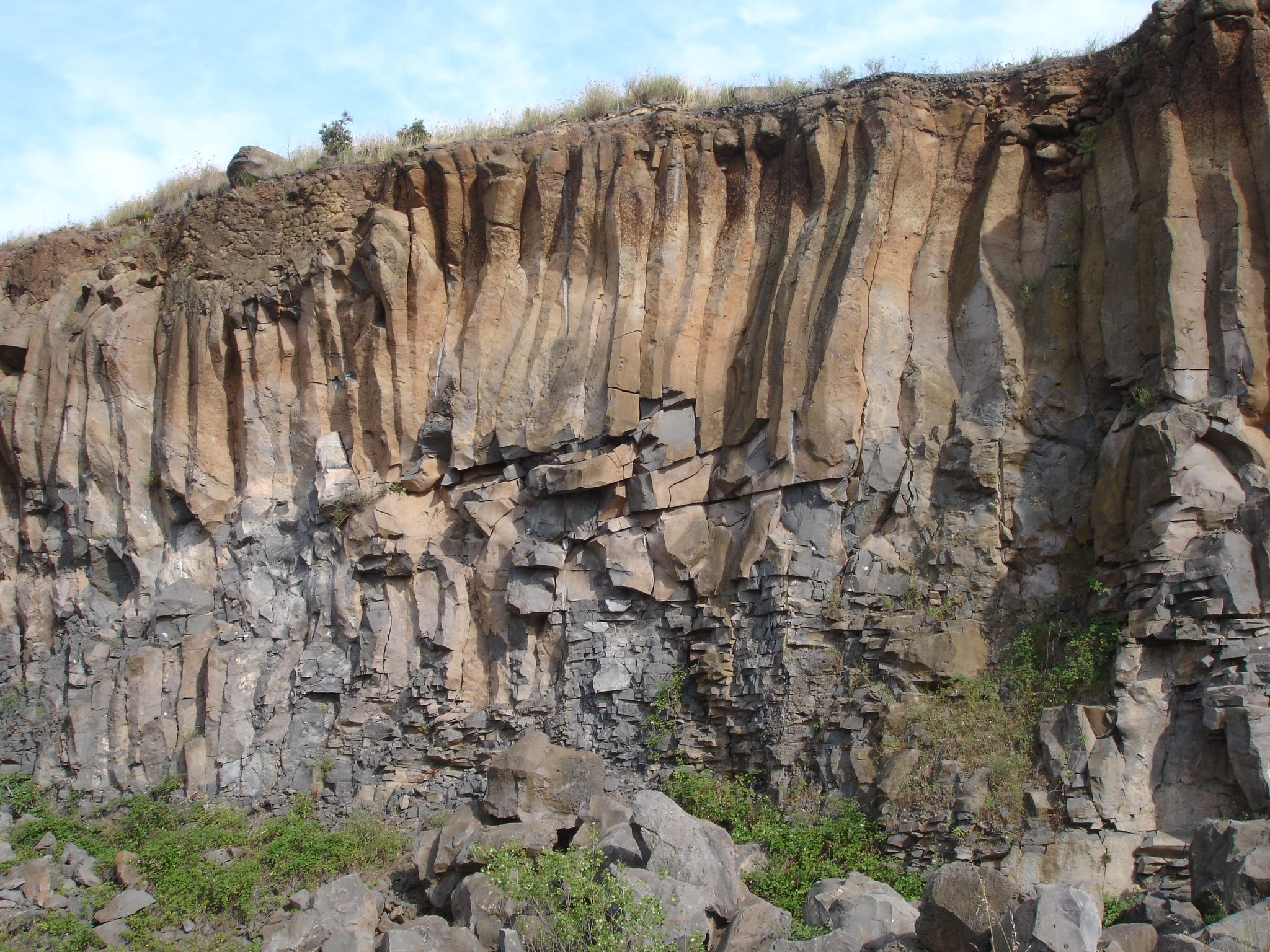 France, Hérault (34), Saint-Thibéry, Coulée basaltique en forme d'orgue